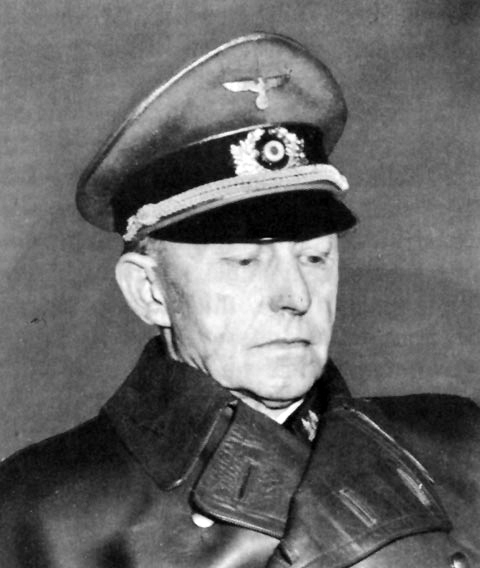 Alfred Jodl